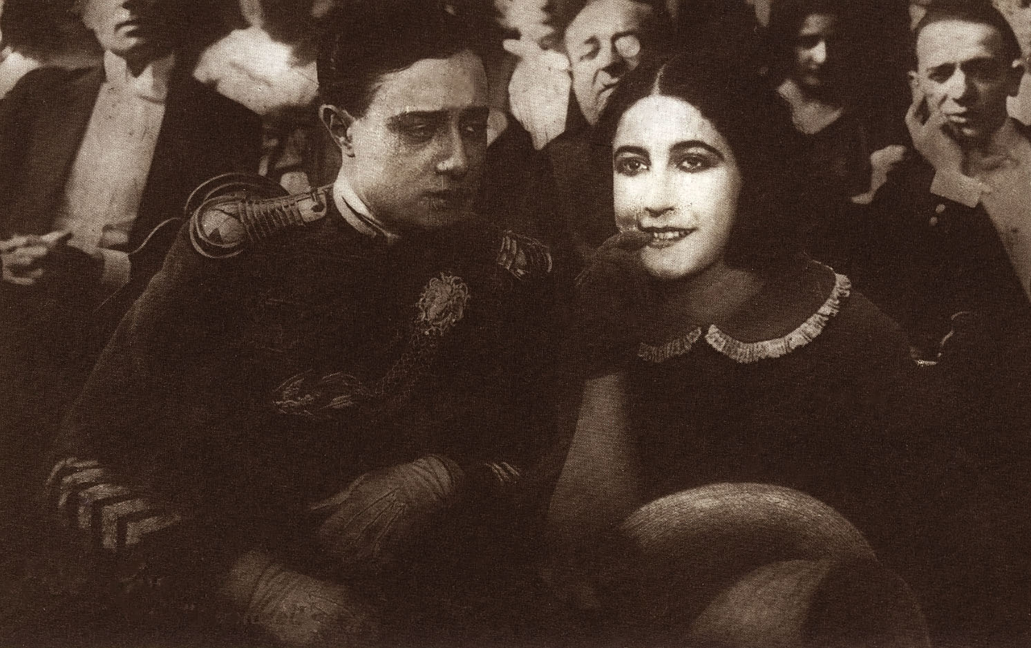 Ubaldo Maria Del Colle